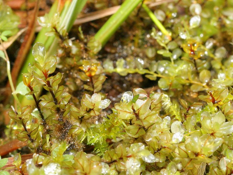 Dunkelblättriges Kuppelmoos (Cinclidium stygium)